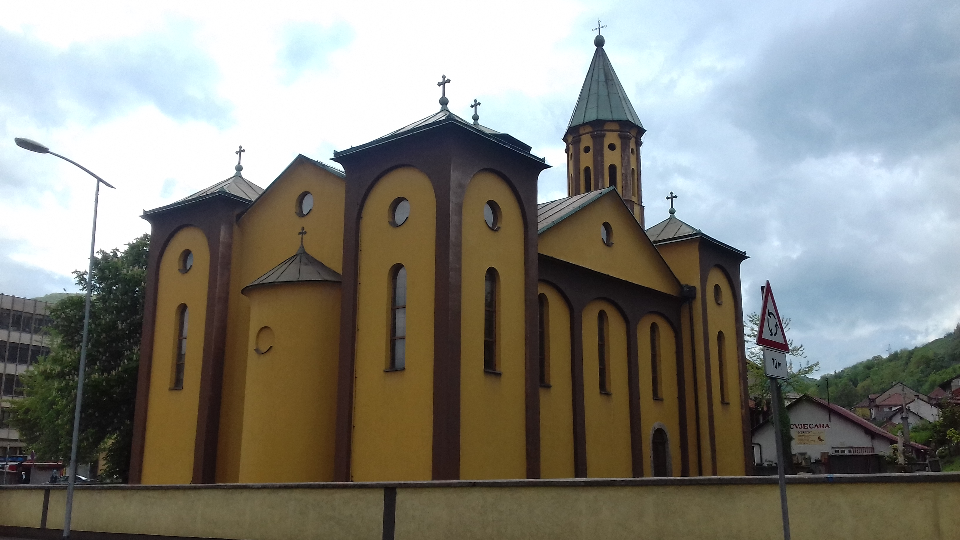 Жута СПЦ Богородице на Царини у Зеници